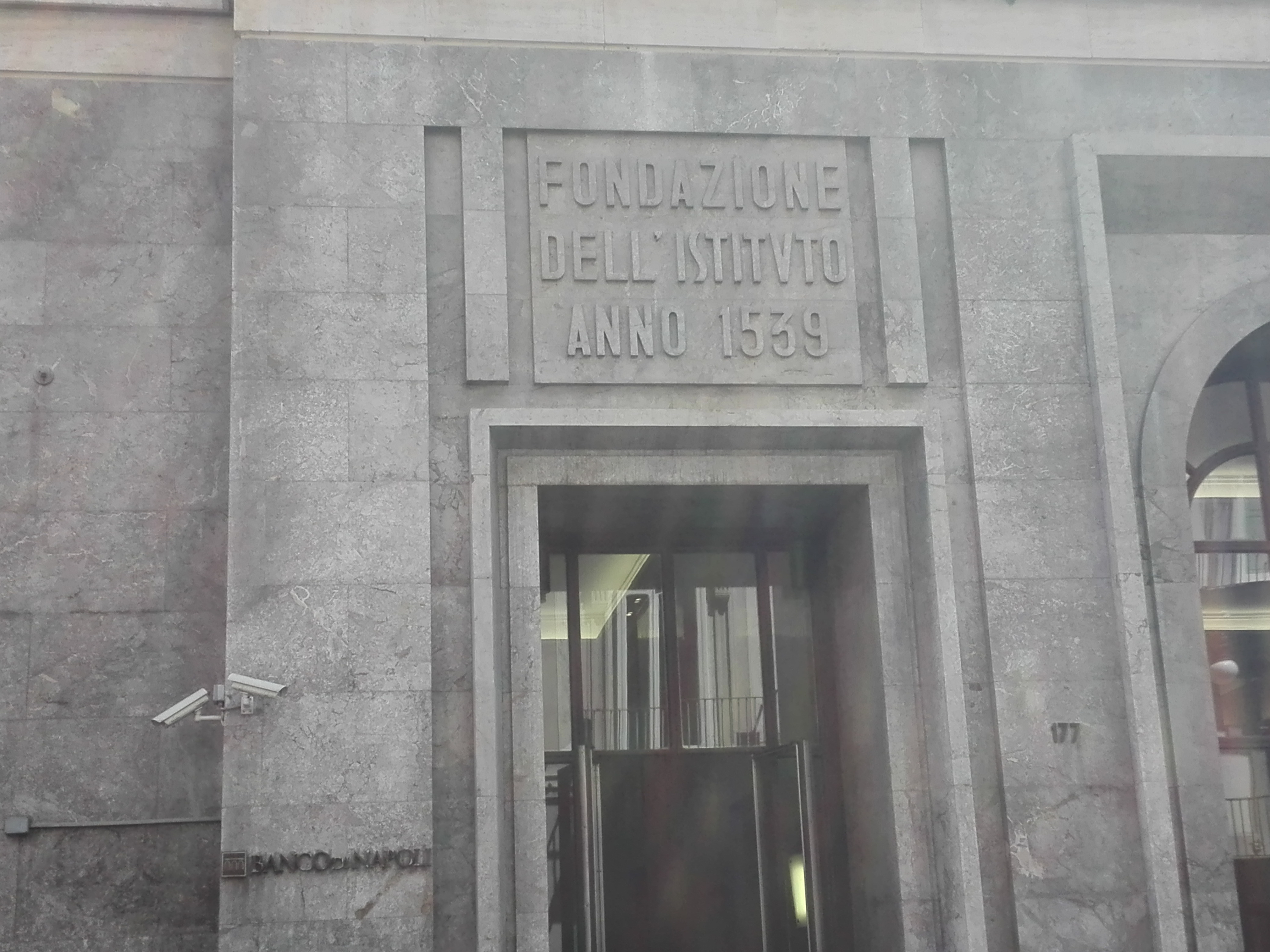 Entrata della storica banca situata a Napoli